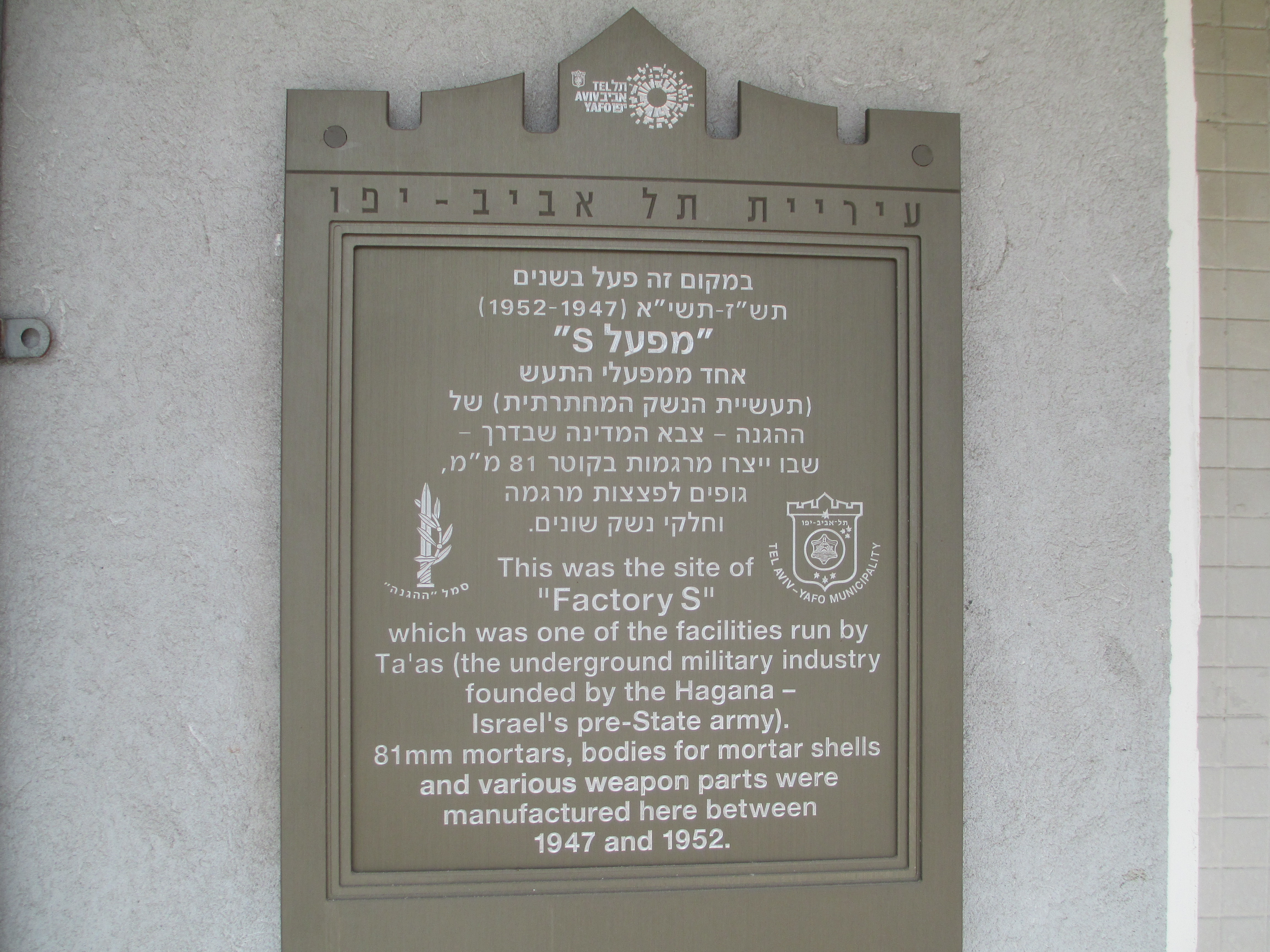 לוחית זיכרון במקום בו עמד מפעל תע"ש אס של ההגנה ברחוב יגאל אלון 157 בתל אביב